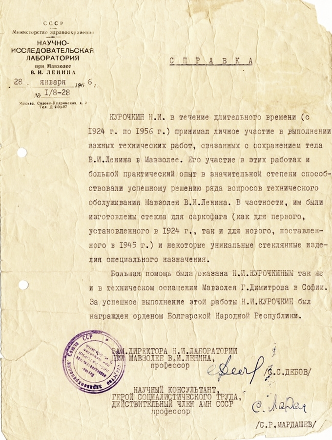 Справка, выданная Никанору Илларионовичу Курочкину о его вкладе в оформление мавзолеев В. И. Ленина и Г. Димитрова